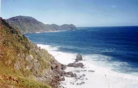 Rocas de Anay en la costa occidental de la Isla Grande de Chiloé